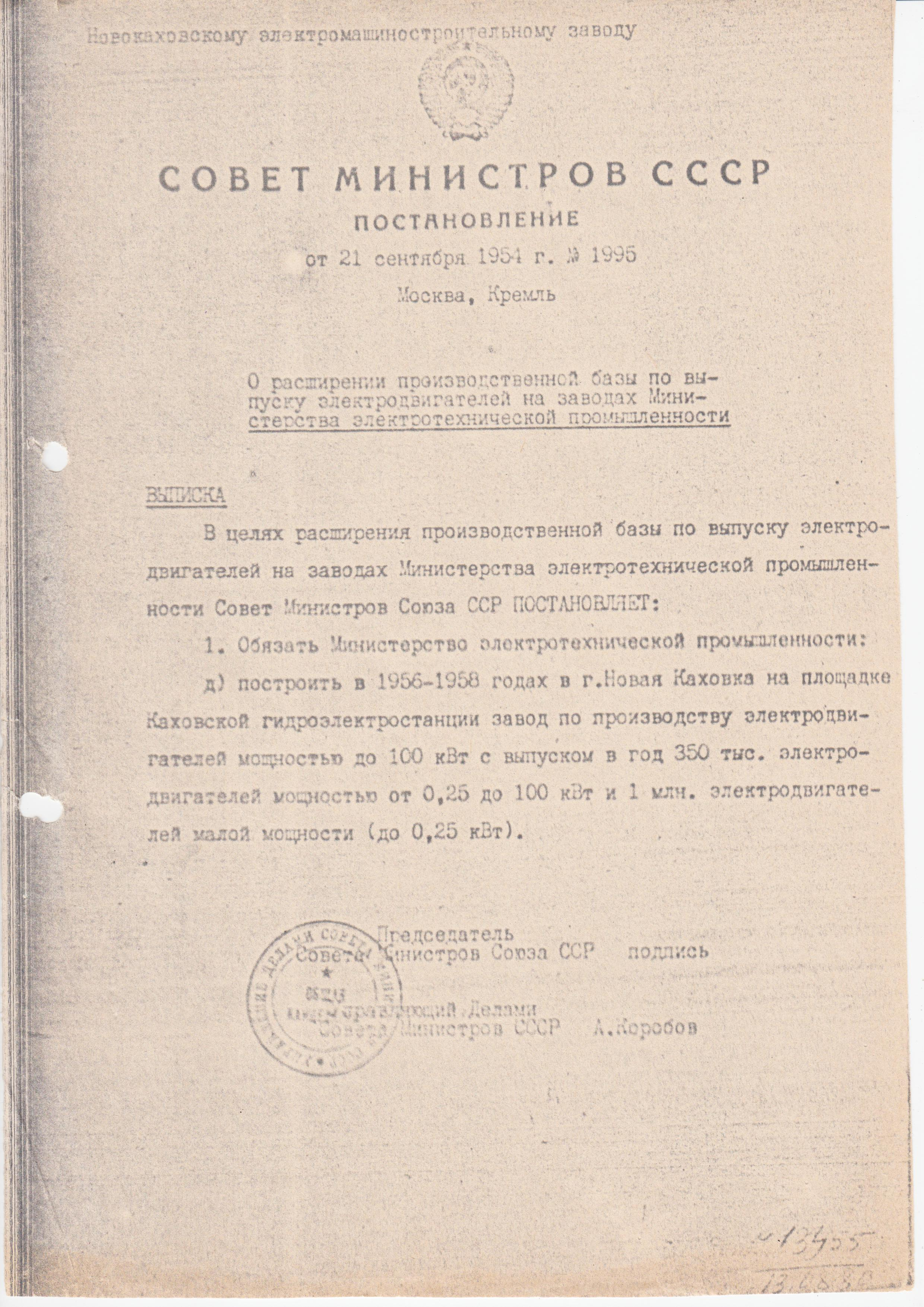 Копия Постановления Совета Министров СССР о строительстве НКЭМЗ (Новая Каховка)